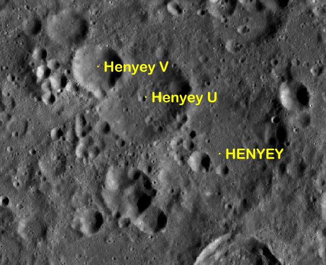 Cráter lunar Henyey. Cráteres satélite. (Imagen LRO)